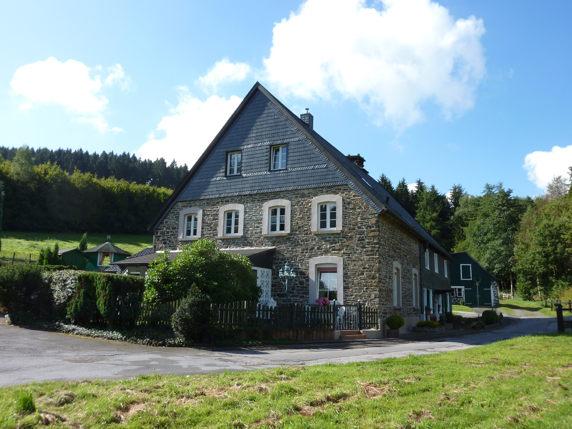 Hof Wittenstein an der Heilenbecke in EnnepetalThis is a photograph of an architectural monument., no. 0